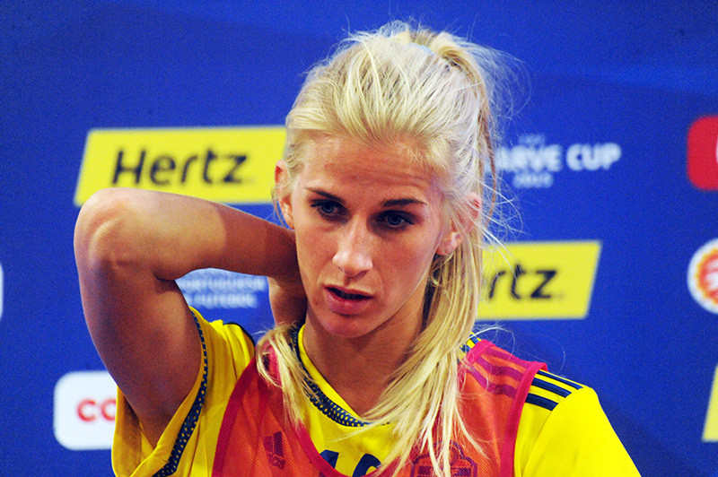 a_148_7780